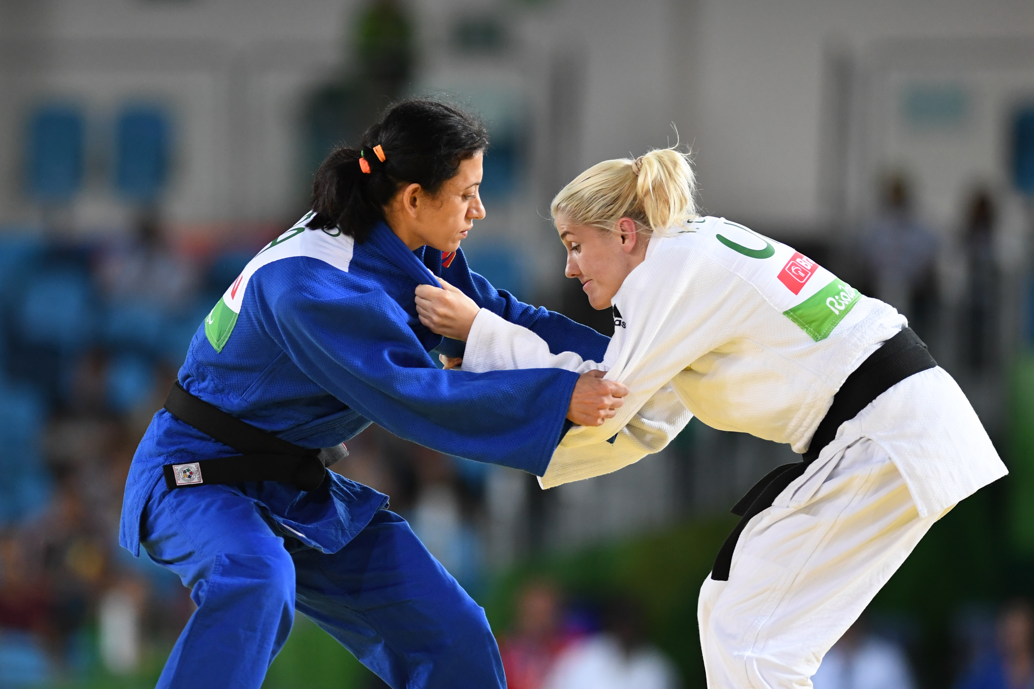 Rio de Janeiro - A brasileira Lucia Araújo perde para a ucraniana Inna Cherniak na final do judô feminino 57kg e fica com a medalha de prata na Paralímpiada Rio 2016 (Tânia Rêgo/Agência Brasil)